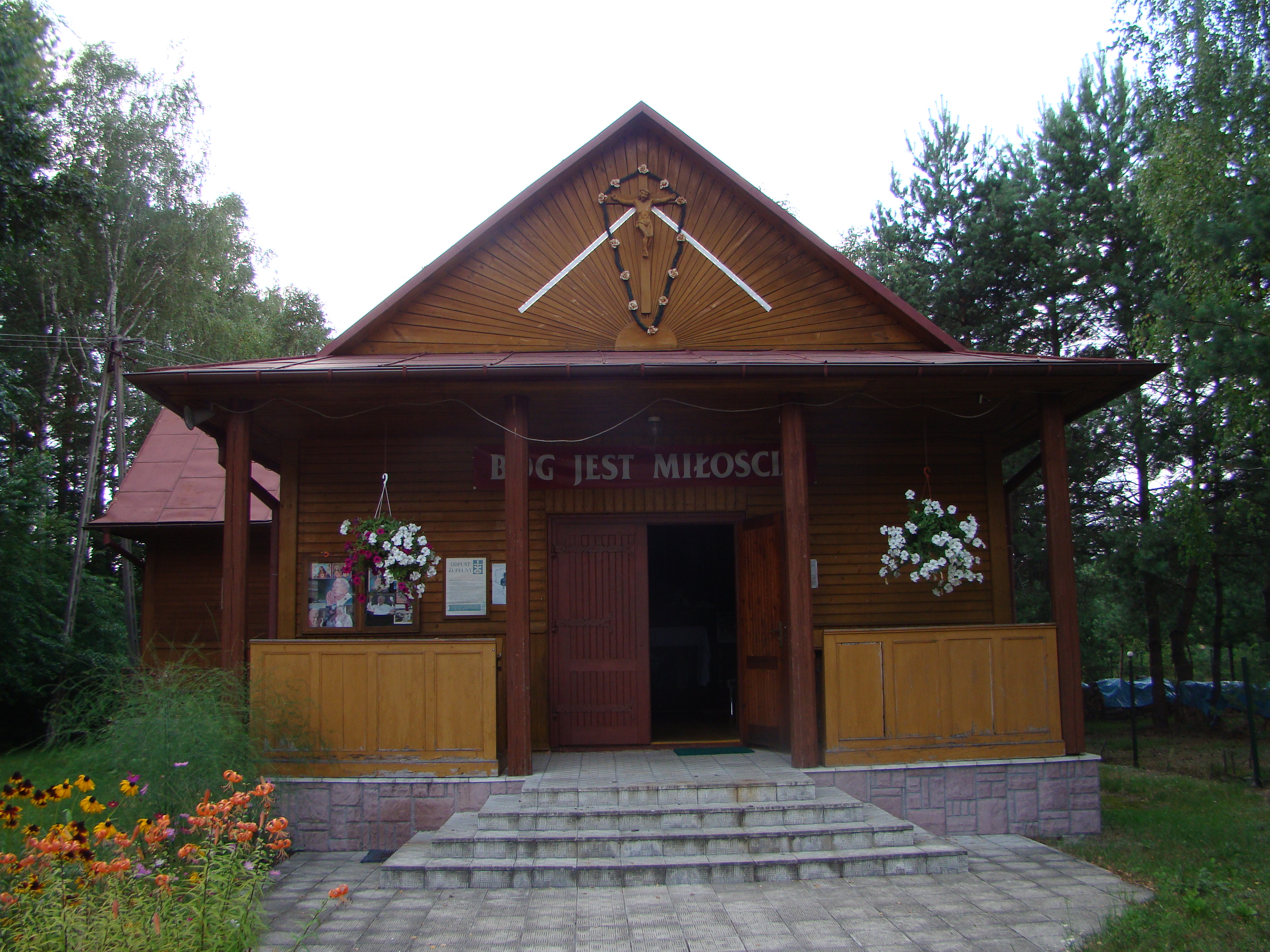 Kaple ve vesnici Kaczórki, Polsko